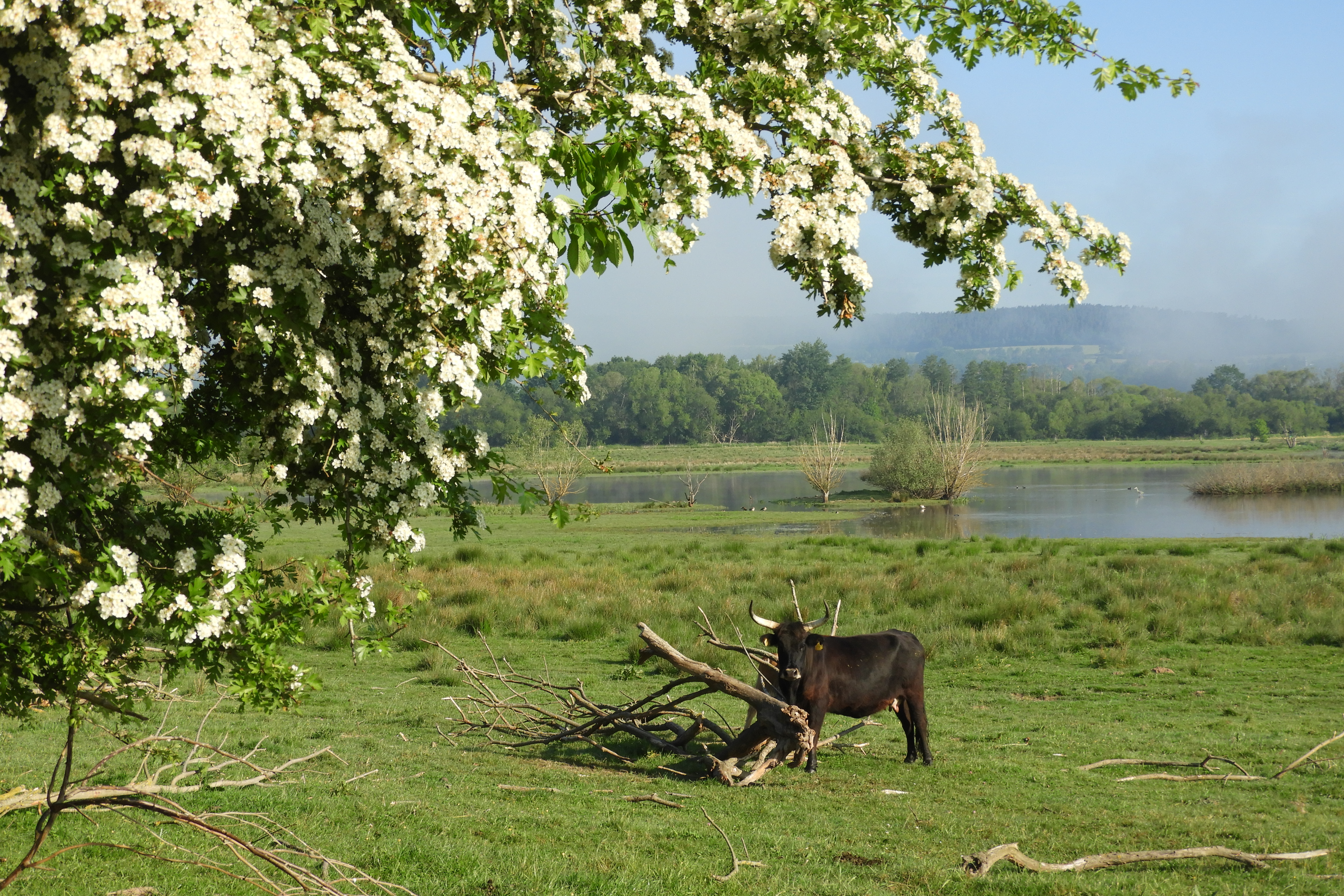 Der „Dankmarshäuser Rhäden“ liegt in der Gemarkung von Dankmarshausen, einem Ortsteil der Stadt Werra-Suhl-Tal im westthüringischen Wartburgkreis. Er ist der südliche Teil eines großen Feuchtgebiets, in einer durch Salzauslaugungsprozesse und tektonische Vorgänge entstandenen Senke im thüringisch-hessischem Grenzland. Einst war das Gelände eine der größten Sumpflandschaften in der breiten Talniederung der Werra. Nach der Trockenlegung, in der Mitte des 19. Jahrhunderts und langjähriger Grünland- und Ackernutzung, wurde das Gelände durch gestaltende Renaturierungwieder zu einer Auenlandschaft, die von naturnahen Biotopen geprägt wird. Die Rhädensenke gehört zu den bedeutendsten Brut- und Rastgebieten für Wasservögel und Wiesenbrüter in Thüringen und Hessen. Seltenen Tier- und Pflanzenarten bietet sein Gelände Lebensräume. Um diesen vielfältigen Bereich zu erhalten und weiter zu entwickeln, wurden die Fläche zum Naturschutzgebiet erklärt und als ein Flora-Fauna-Habitat-Gebiet in dem europaweiten Netz von Schutzgebieten „Natura 2000“ ausgewiesen. Der Rhäden wird als wichtiger Bestandteil des Verbundsystems „Feuchtbiotope der Werraaue“ und des „Grünen Bandes“ entlang der ehemaligen innerdeutschen Grenze angesehen.